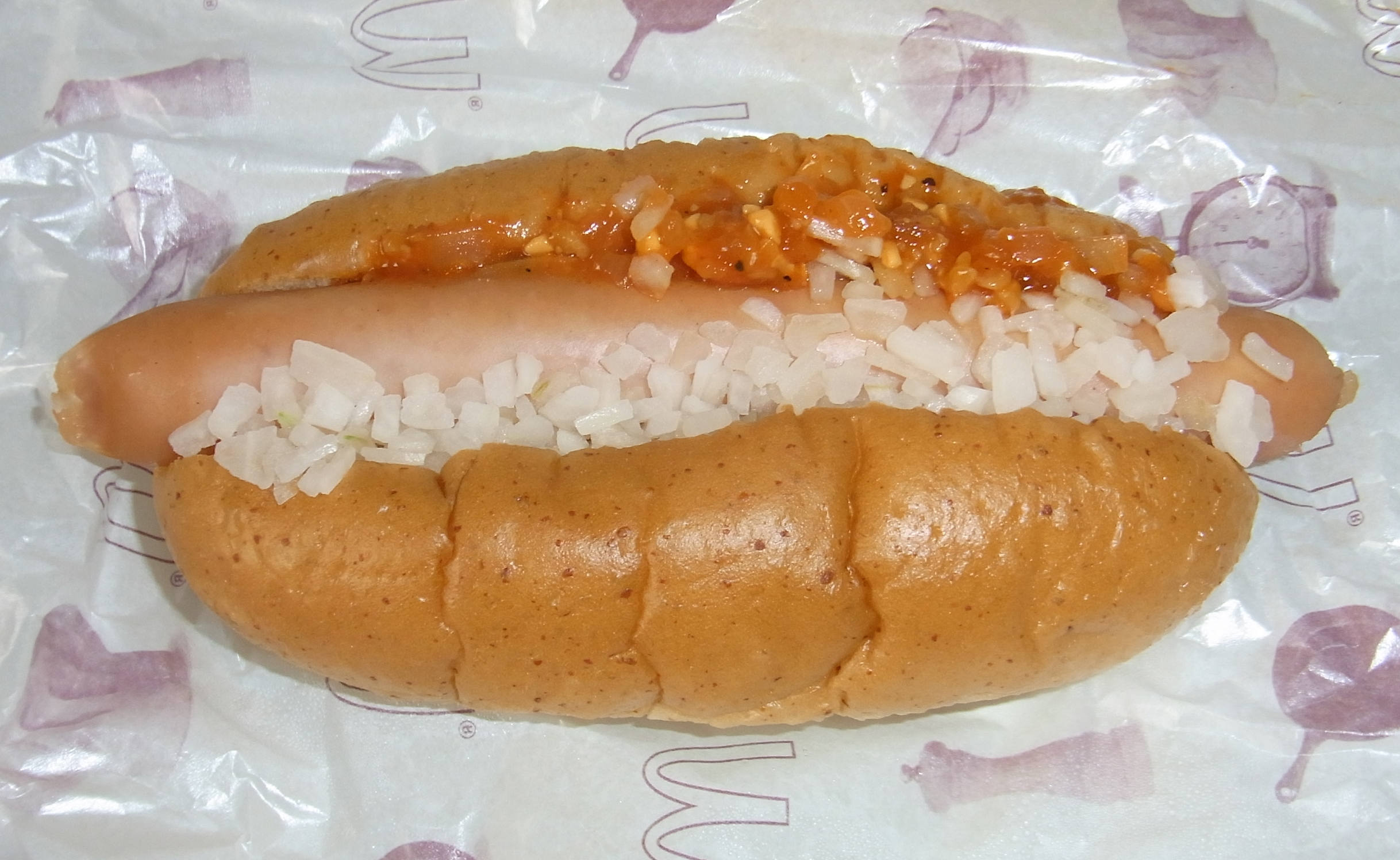 マックホットドックチリ 2011年11月14日から期間限定発売 11/30購入